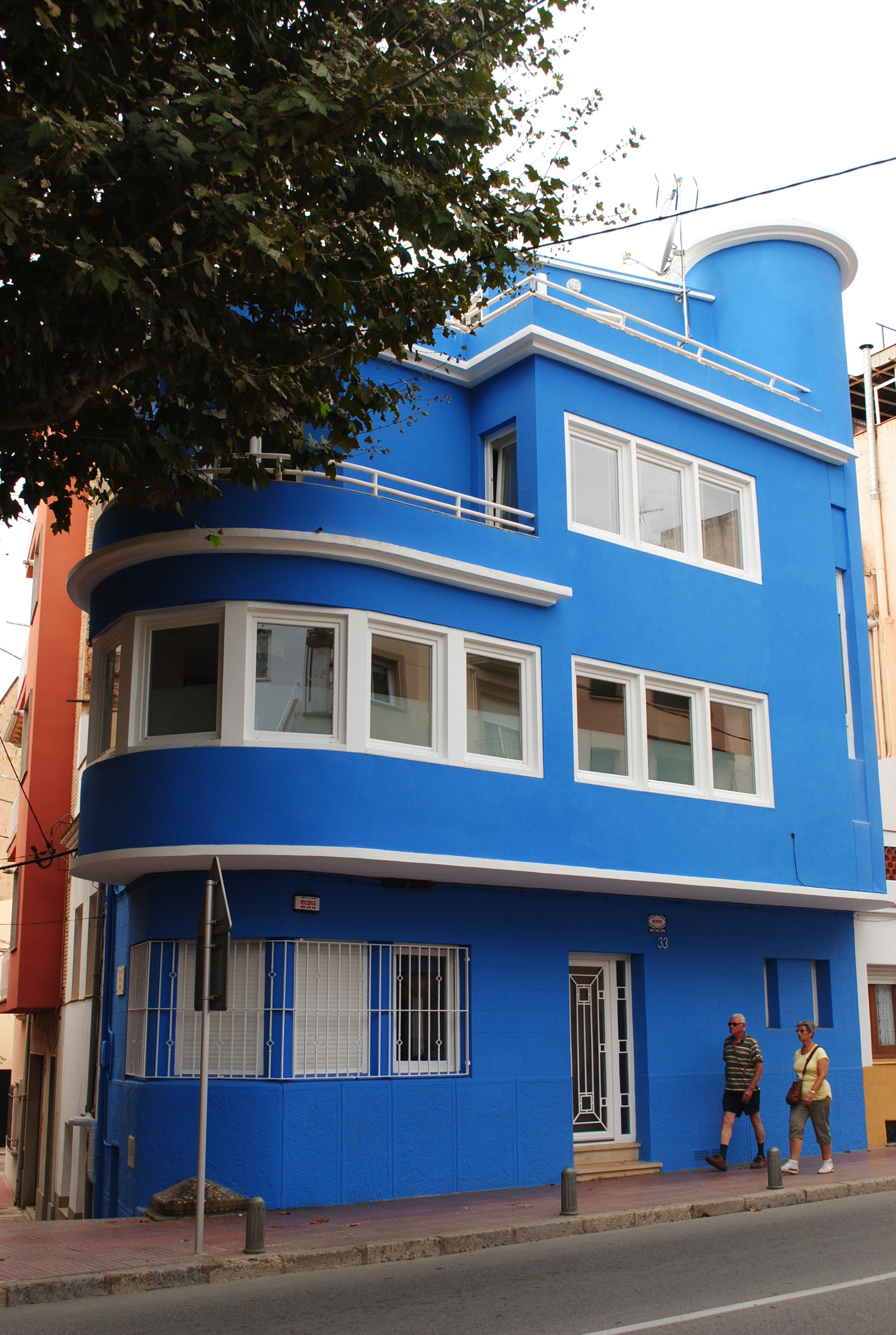 Casa Dawson (Sant Feliu de Guíxols), 1941, és una obra racionalisme de l'arquitecte Joan Bordàs i Salellas